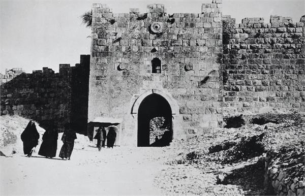 ירושלים - עוברי אורח בשער הפרחים.